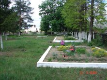 malorita צילום פרטי שנמסר לצורך פרסום בויקיפדיה תאריך יצירה:13 בינואר 2007 יוצר יוסי אהרונסון